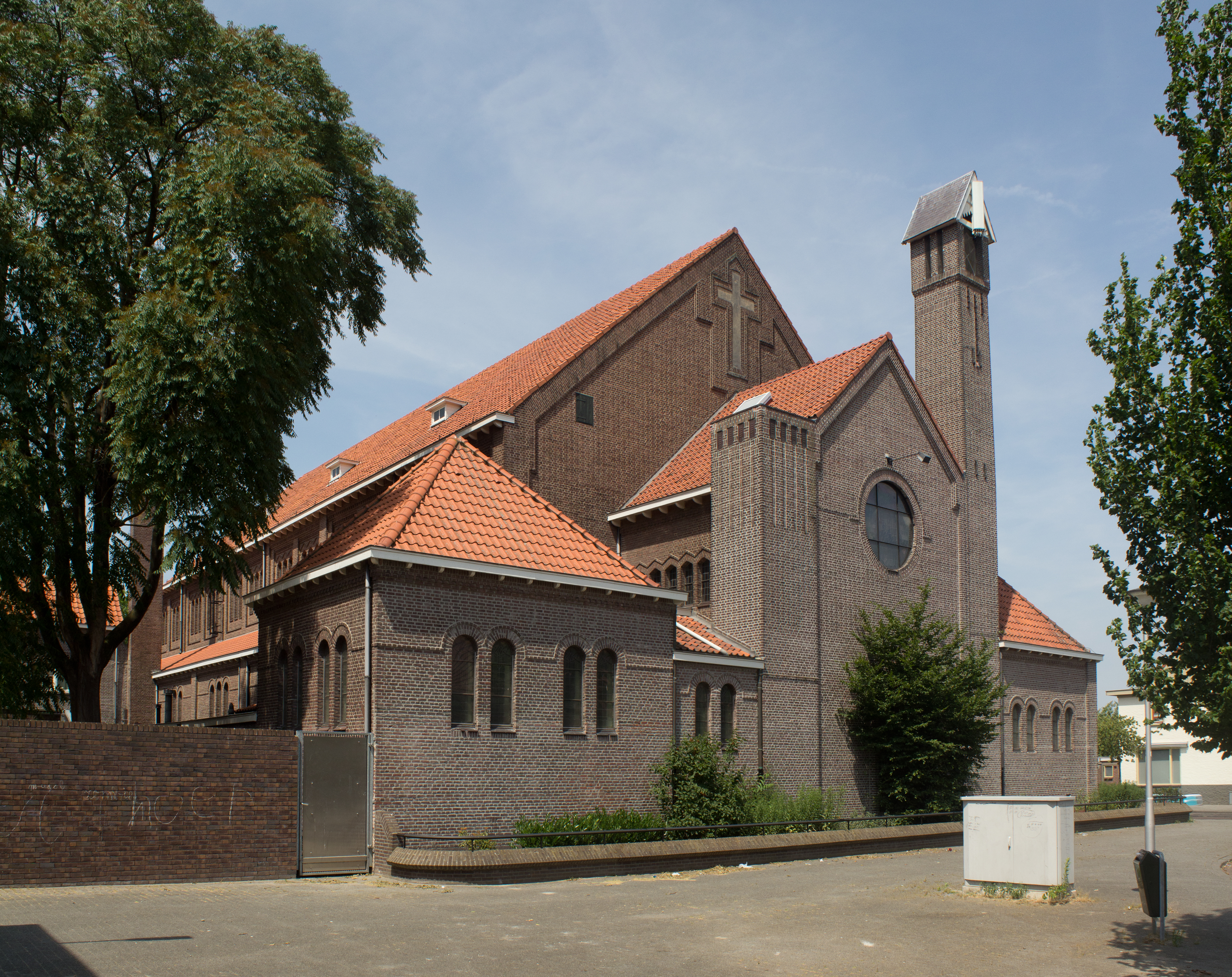 Achterzijde Gerardus Majellakerk te Tilburg.